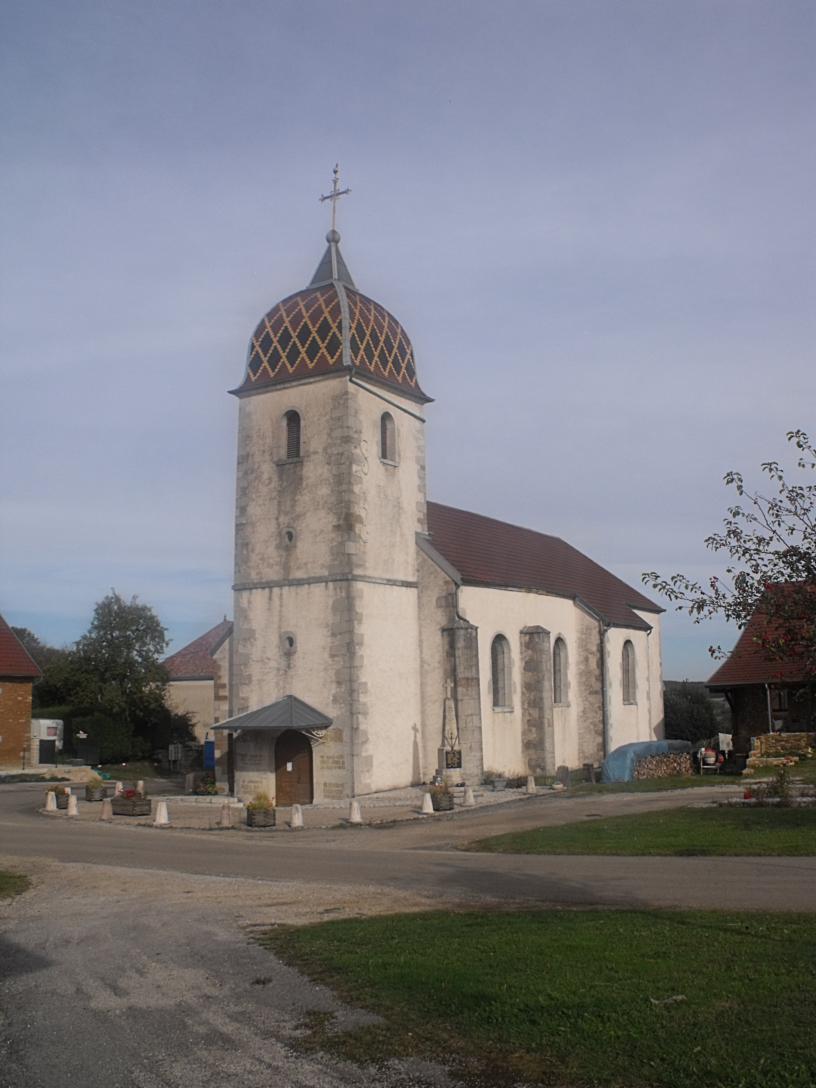 Eglise de Viethorey, Doubs, France